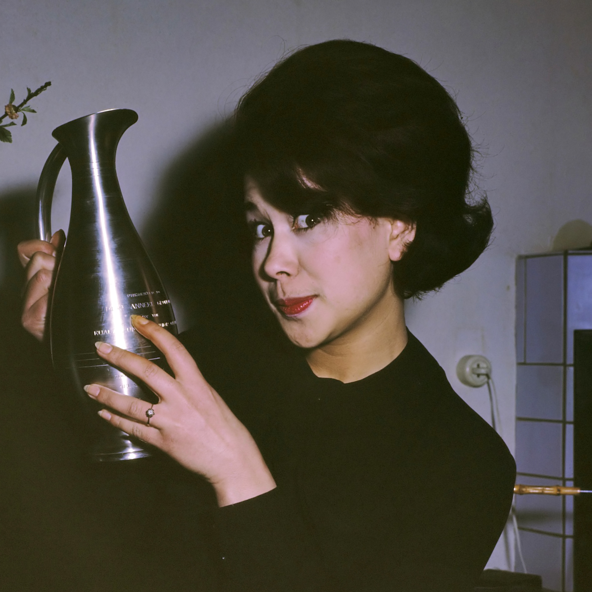 Anneke Grönloh. Anneke in haar ouderlijk huis met een 'vaas' gegraveerd met haar naam (mogelijk uitgereikt n.a.v. haar hit 'Oh, Malaysia' - een Engelse versie van Brandend Zand uit 1962). Plaats: Amsterdam, Noord-Holland. Foto: ca. 1962